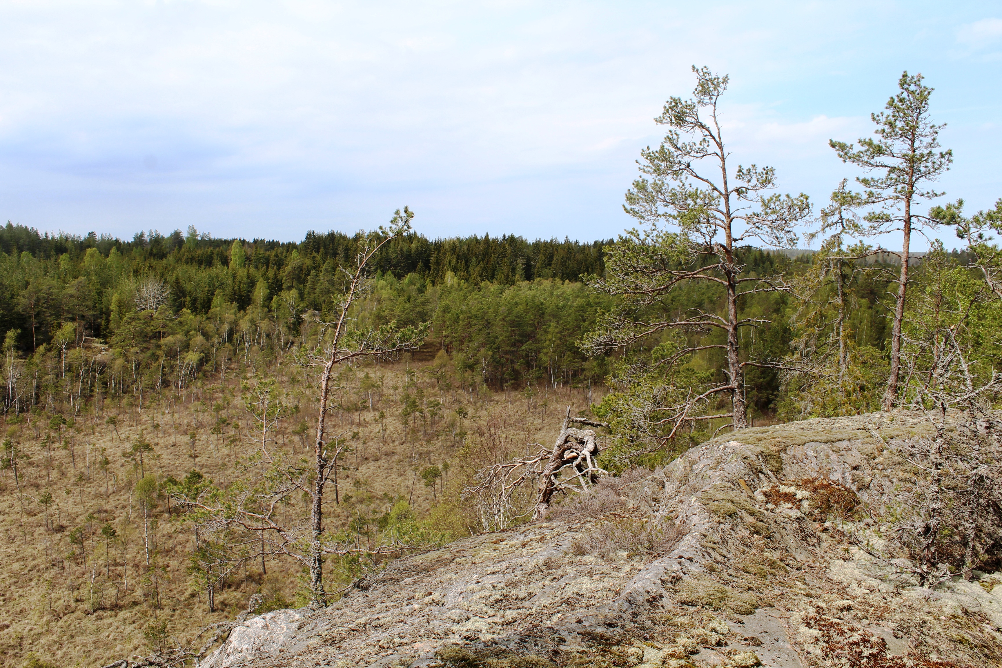 Vy över södra Slätmössen, del av naturreservatet Slätmossen-Borgberget, Nynäshamns kommun